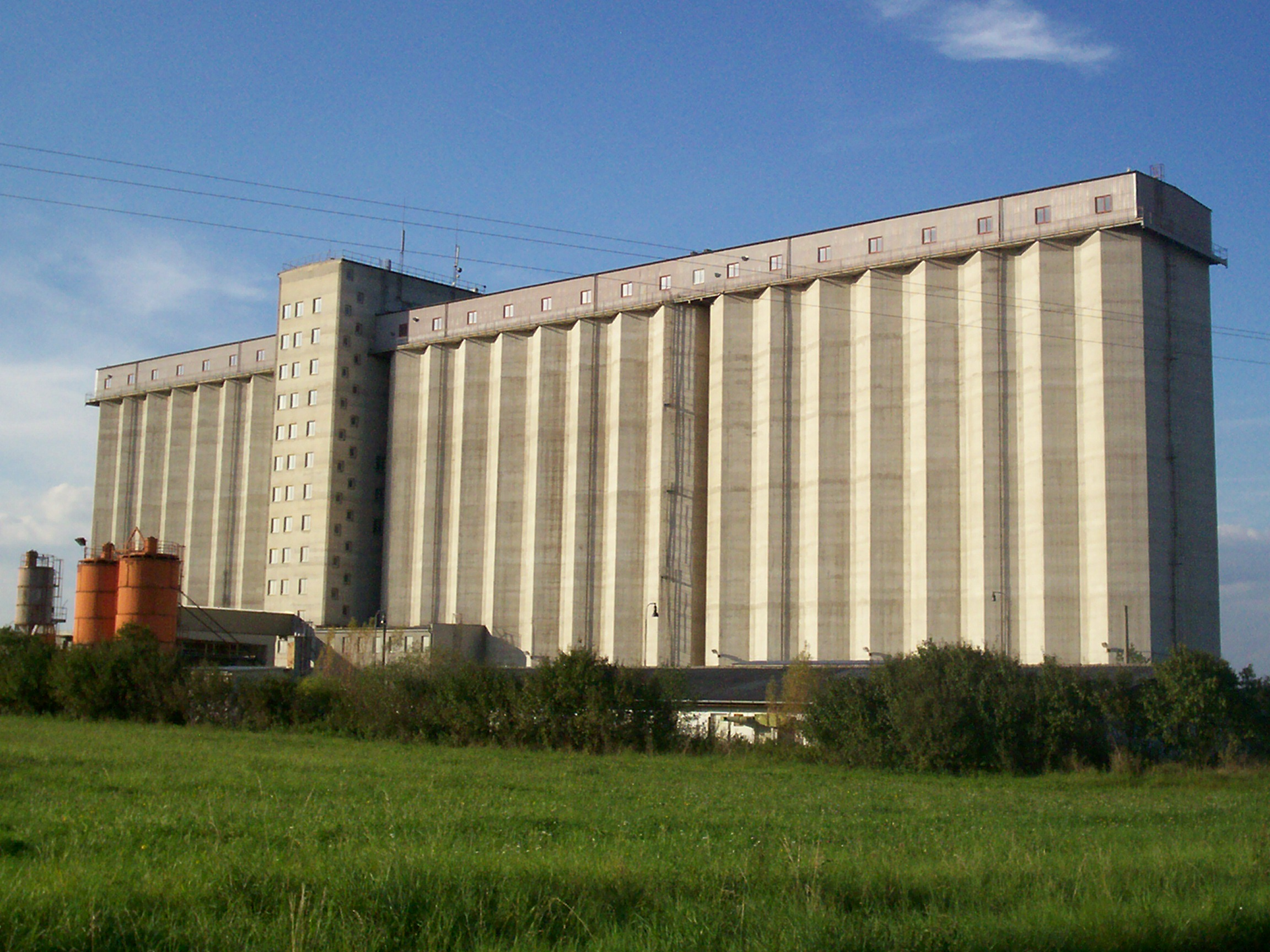 Silo Blovice, vyfotografováno směrem od železničního přejezdu s tratí č. 191 (Plzeň-České Budějovice)